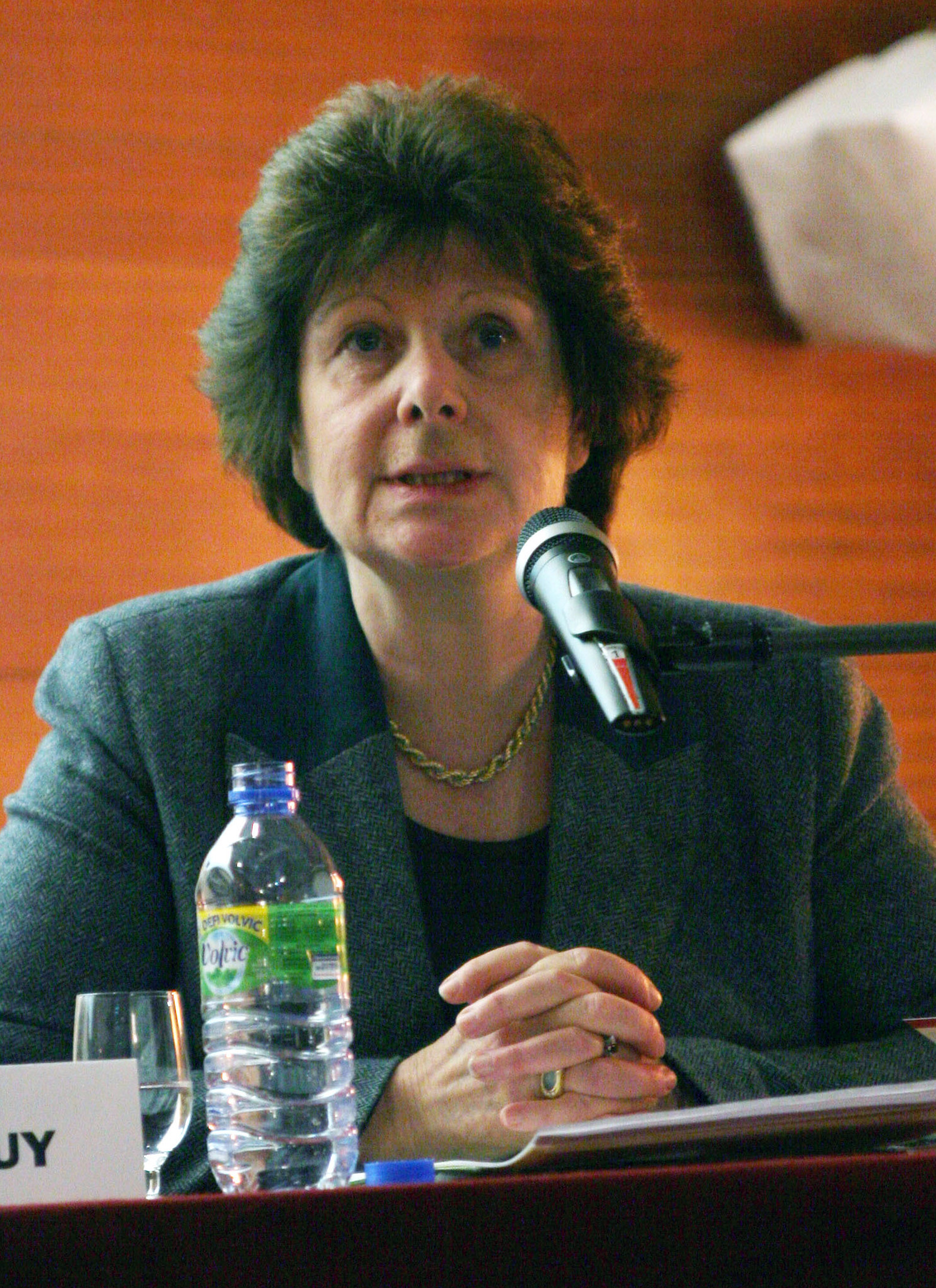 Anne de Tinguy le 4 novembre 2009 lors du colloque international "Sortir du communisme, changer d'époque" organisé par Fondapol en partenariat avec la Fondation Robert-Schuman.